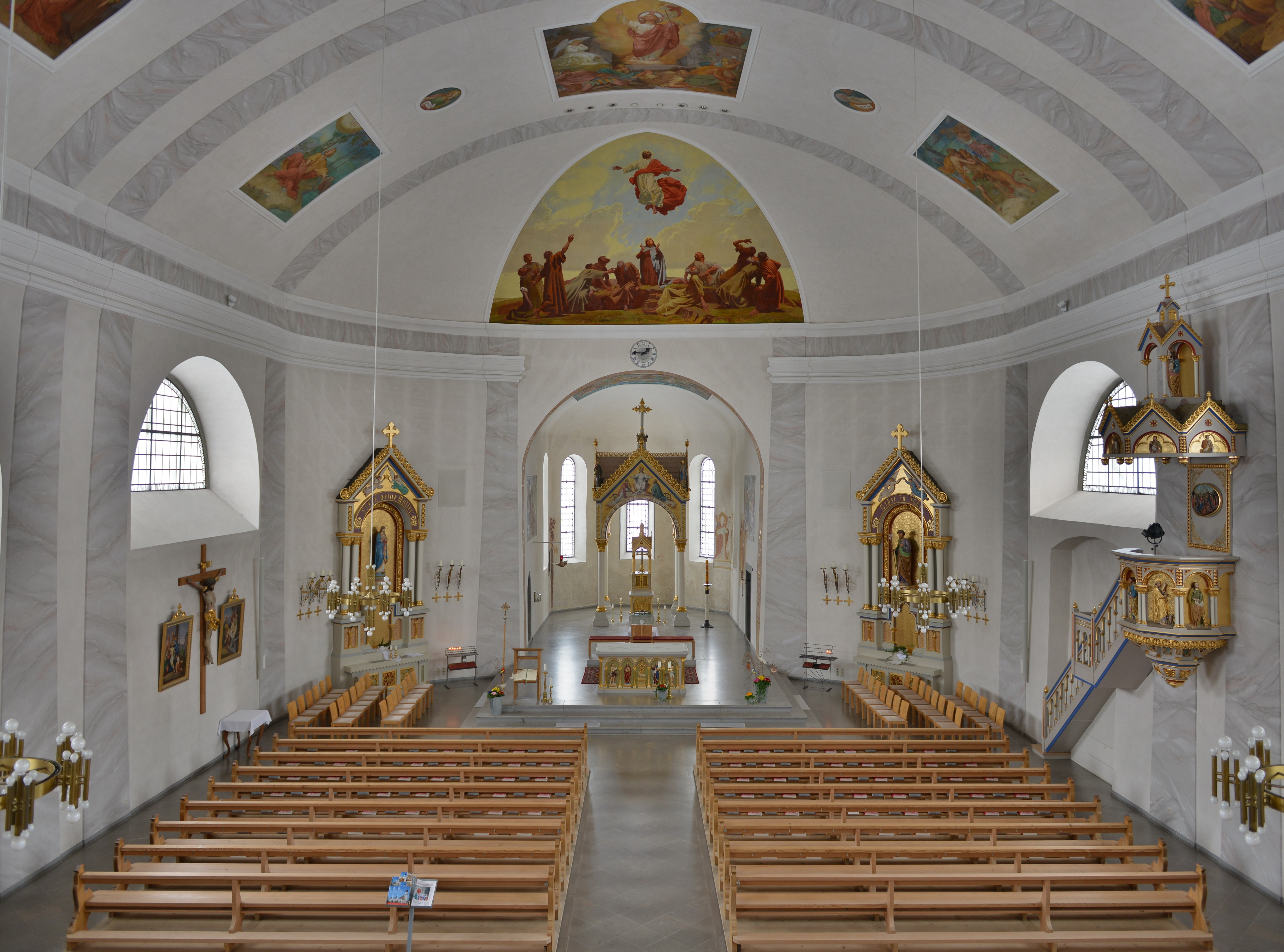 Pfarrkirche hl. Laurentius in Sulzberg, Vorarlberg. aus dem DEHIO Vorarlberg 1983: Umbau und Neubau des Langhauses 1828/29 nach Plänen von Alois Negrelli , Weihe 1833.